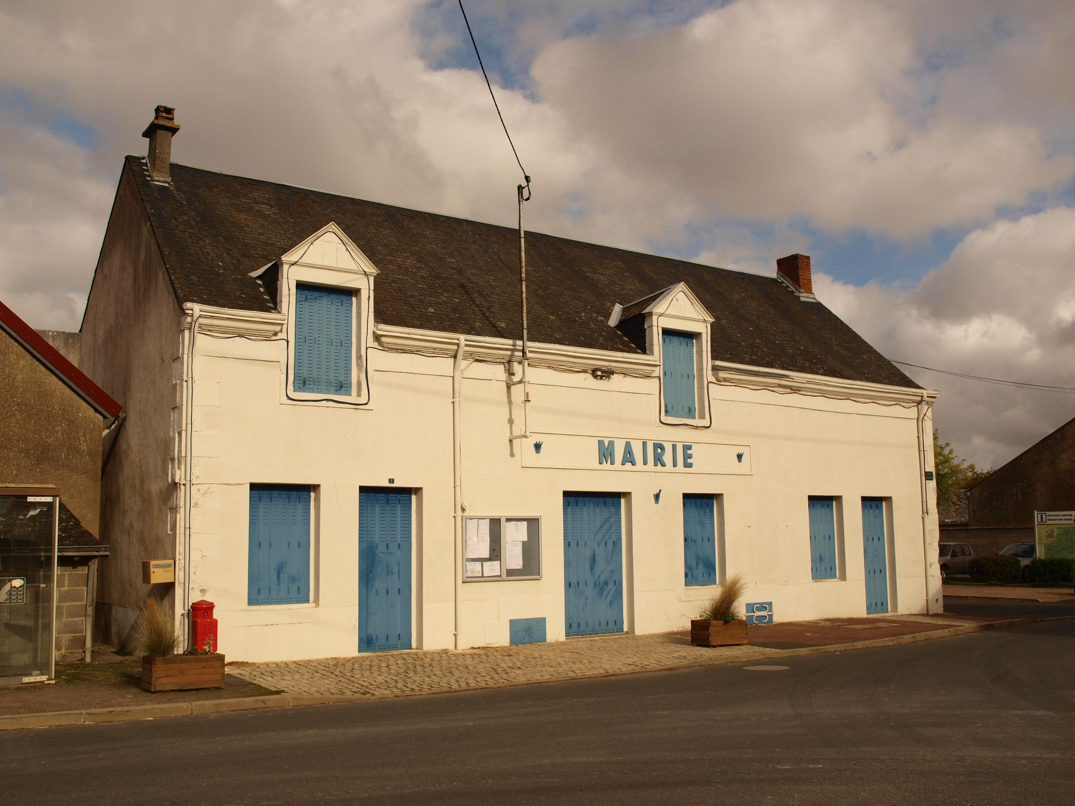 Brion (Indre, France) ; mairie